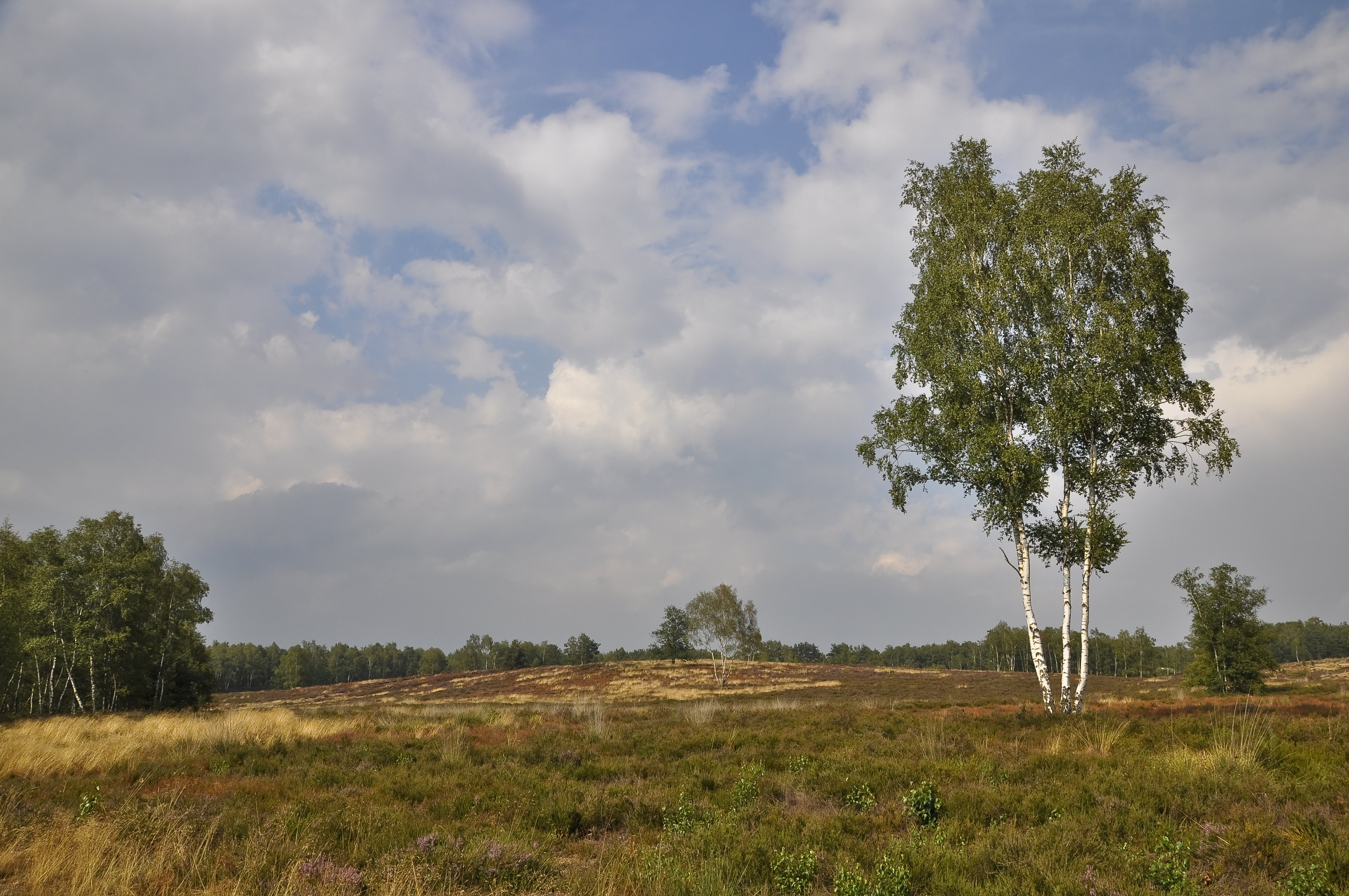 De Teut, een natuurgebied in Zonhoven (België)